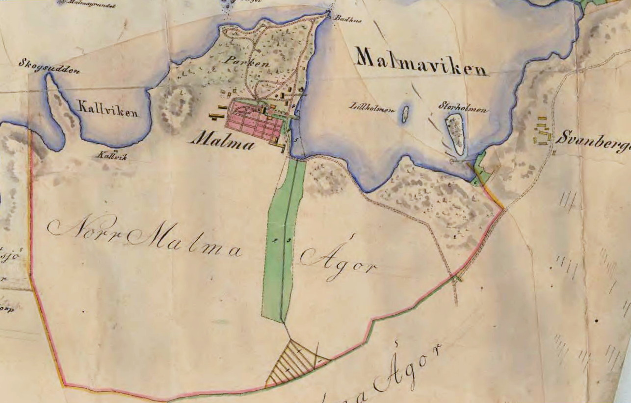 Del av karta över sjön Erken visande Norra Malma ägor